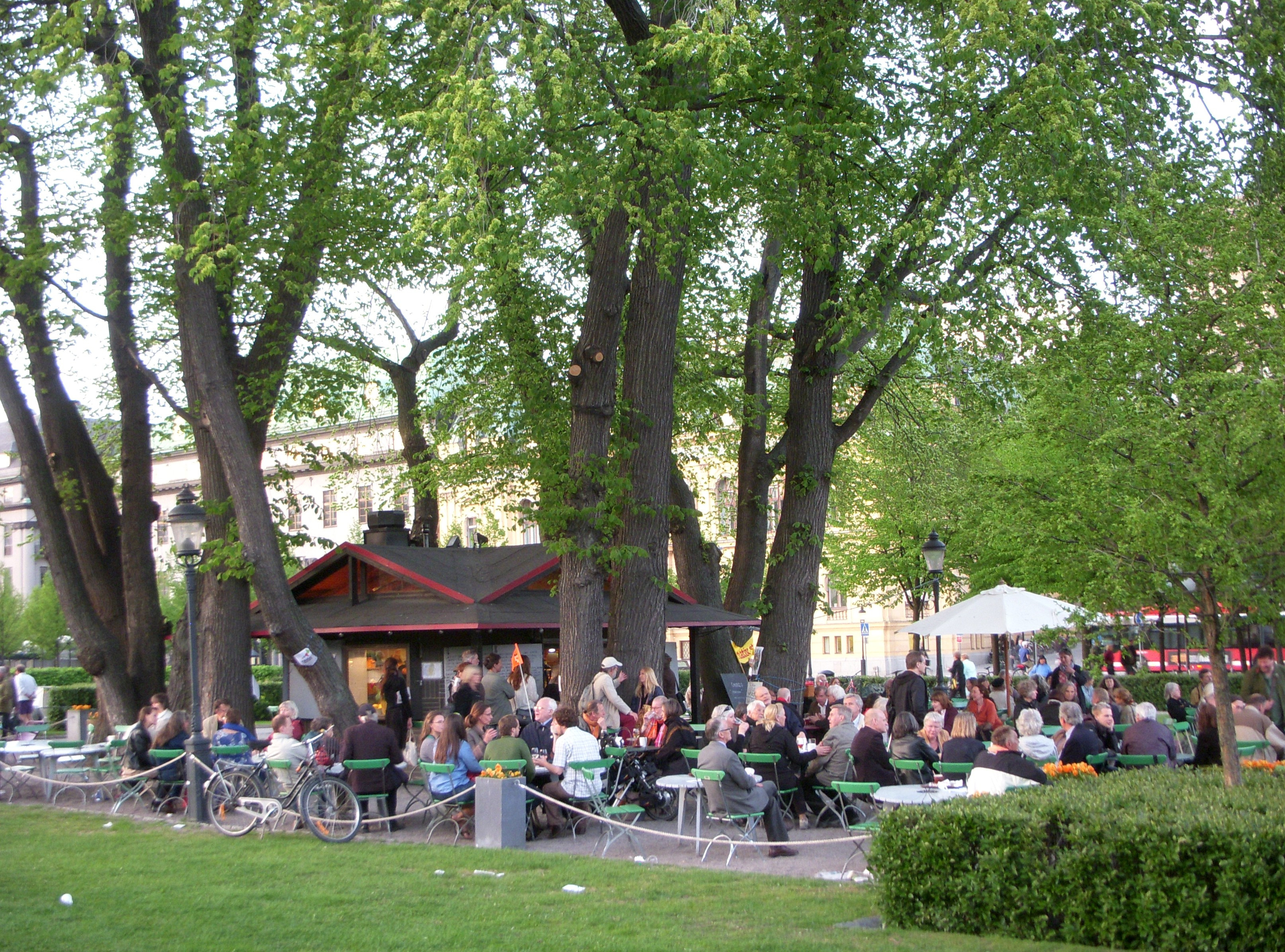 Almstriden i Kungsträdgården firas 40 år senare, 11 maj 2011